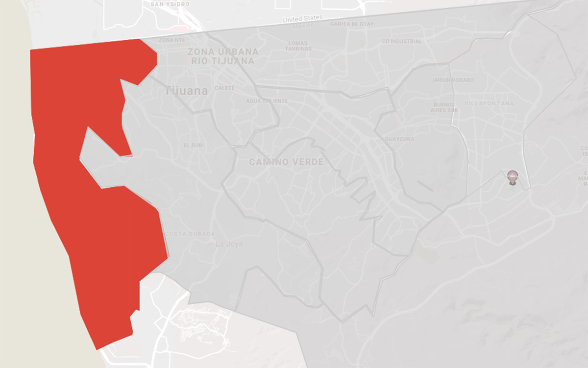 Demarcación territorial de la delegación Playas de Tijuana